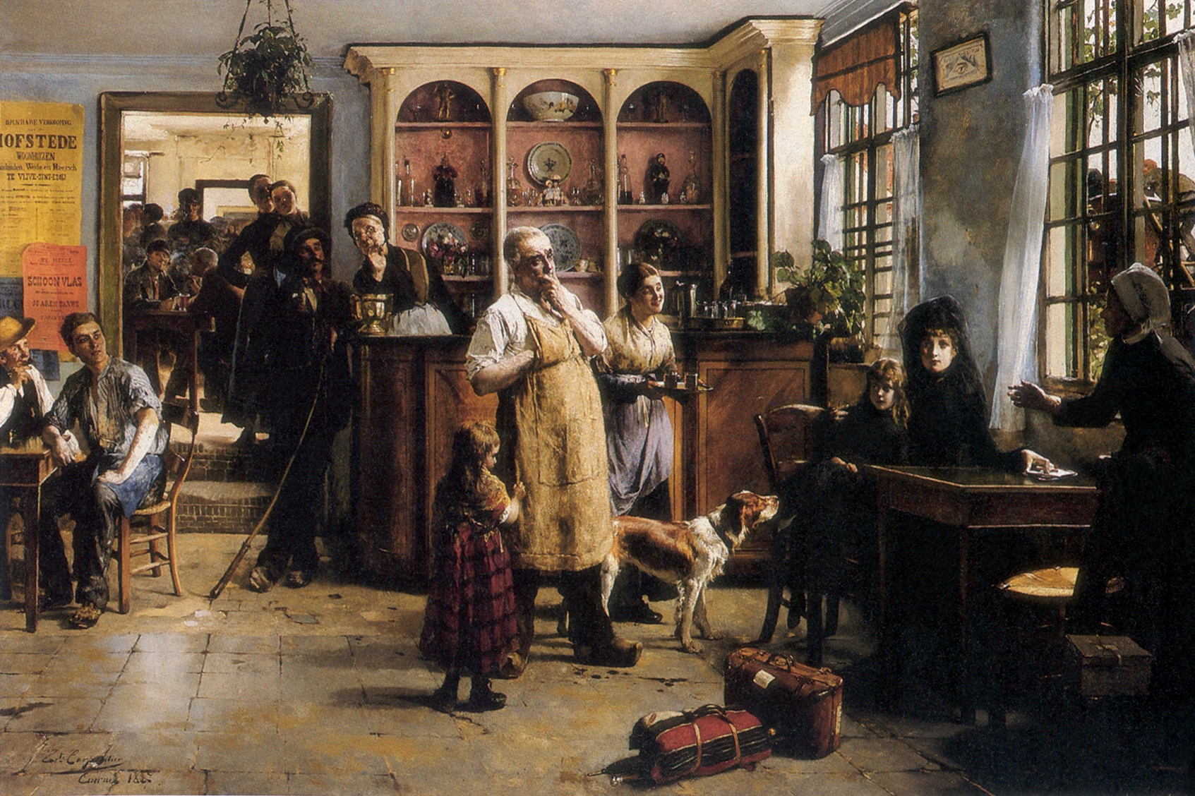 "Deux élégantes touristes, la mère et sa fille, en deuil et l'air navré, descendent, au hasard d'un relais, dans une auberge remplie d'ouvriers et de rouliers qui les regardent."